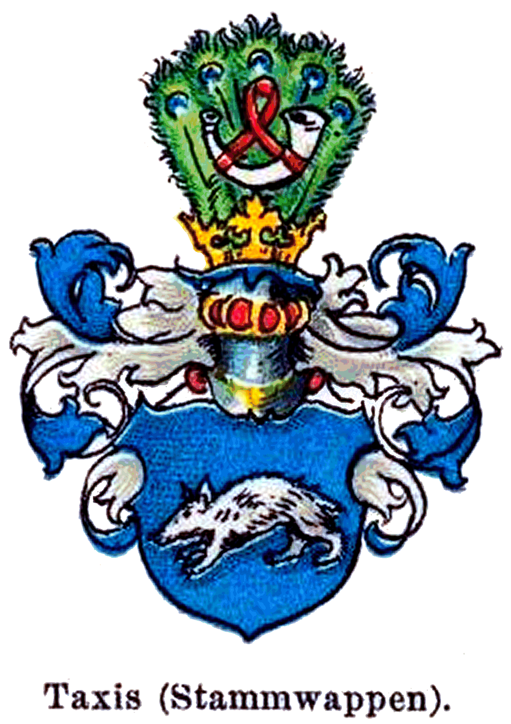 Stammwappen derer von Taxis